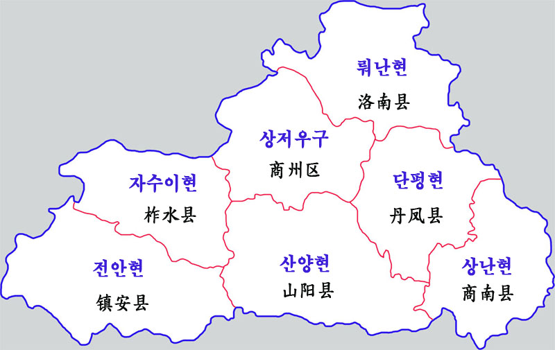 상뤄시 현급행정구역